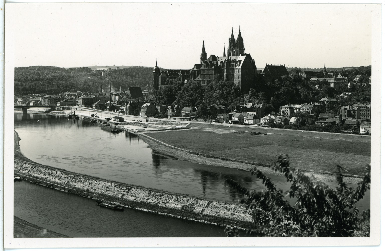 Meißen; Blick von Proschwitz auf Meißen This postcard is from publisher Brück & Sohn in Meißen ( postcard has a unique number 27572 and is available in a higher resolution at the publisher. This images was uploaded in a cooperation project between Wikipedians and the publisher.